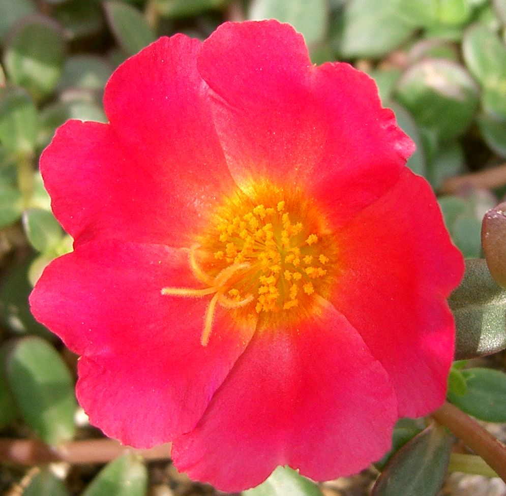 Portulaca oleracea cv.